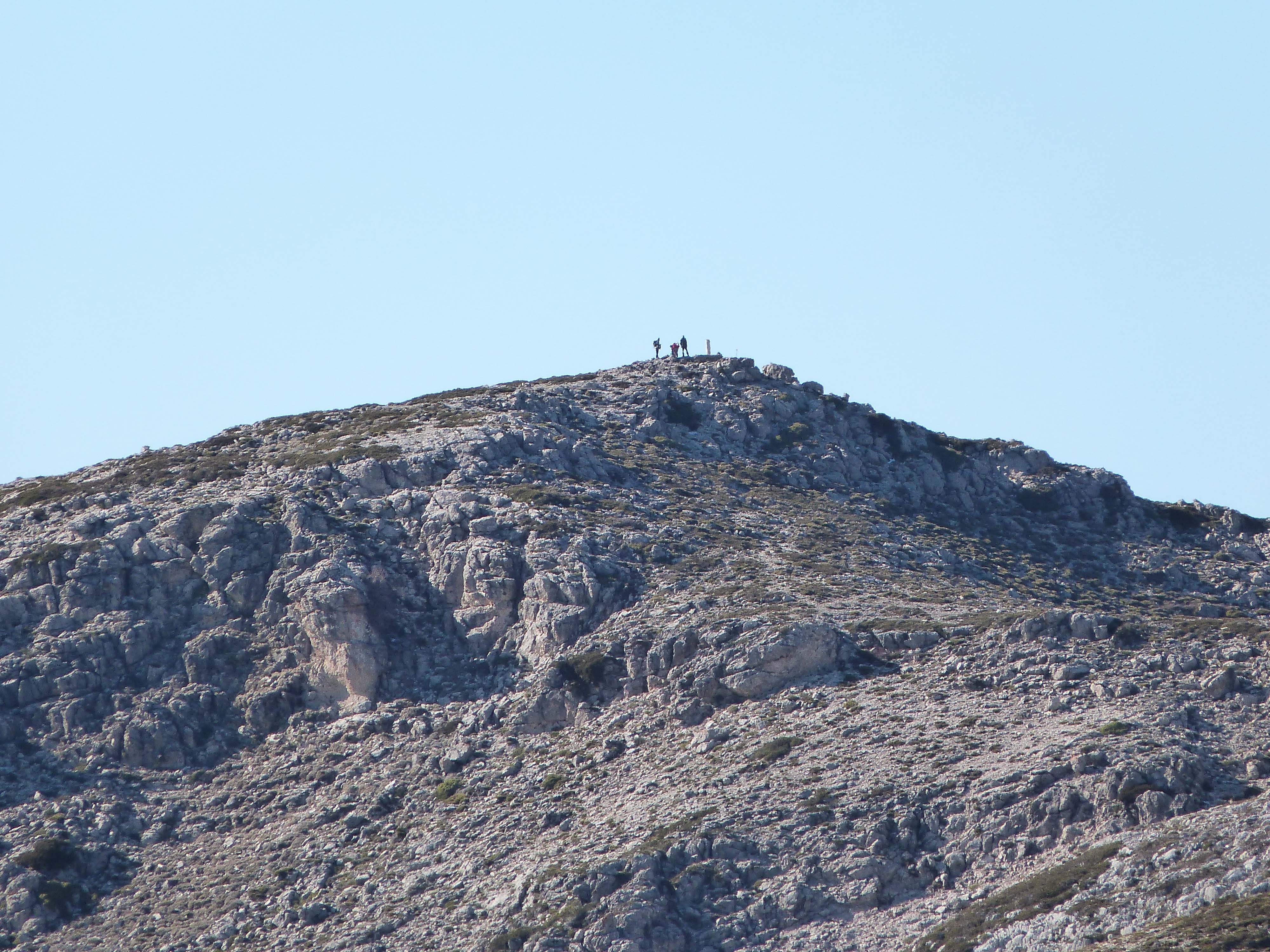 Foto de la cumbre del Pico Mágina desde el Pico Miramundos.